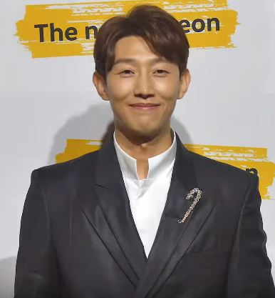 6일 오후 서울시 강남구 신사동 '폭스바겐 아트 & 라이프 스타일 하우스'에서 디 아테온(The Art:eon) 런칭 행사가 열렸다. 이날 이동욱, 김동욱, 빅스 엔(차학연), 강기영이 참석해 포토타임에서 포즈를 취하고 있다.